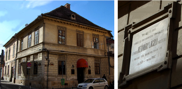 Kőváry László emléktáblája Kolozsvárott: ITT ÉLT ÉS ÍRTA ERDÉLY ÉS MAGYARORSZÁG TÖRTÉNETÉT Dr. UJTORDAI KEŐVÁRY LÁSZLÓ TÖRTÉNETÍRÓ A MAGYAR TUD. AKADÉMIA TAGJA STB. SZ. 1819 – MEGH. 1907. (Kolozsvár, Roosevelt és Bástya utcák sarka)